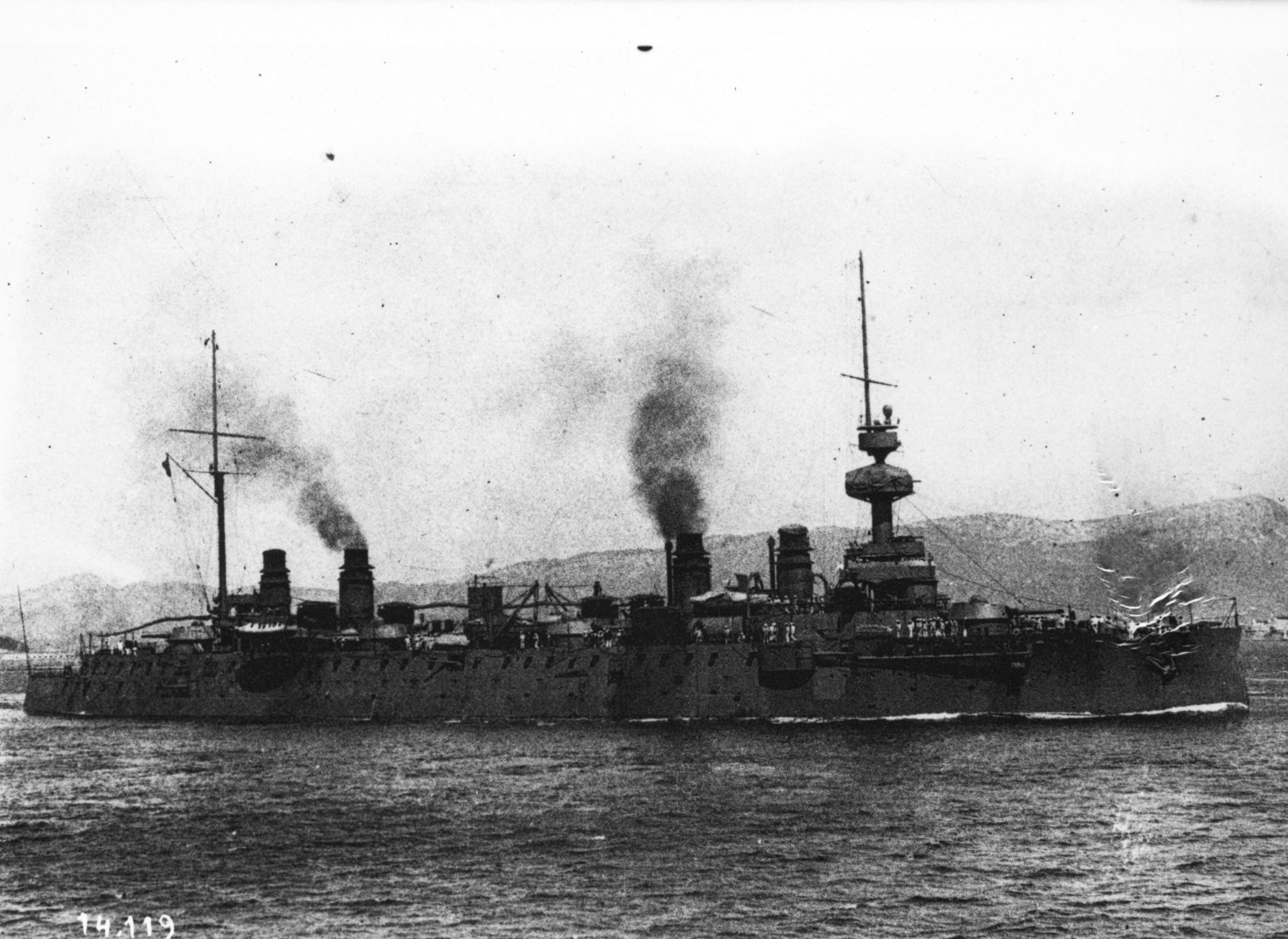 Le croiseur cuirassé Marseillaise en 1911.